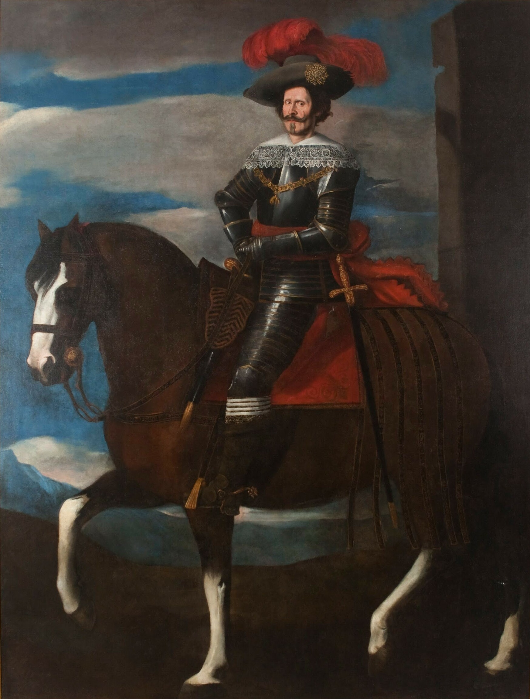 Ritratto equestre di Carlo di Tocco